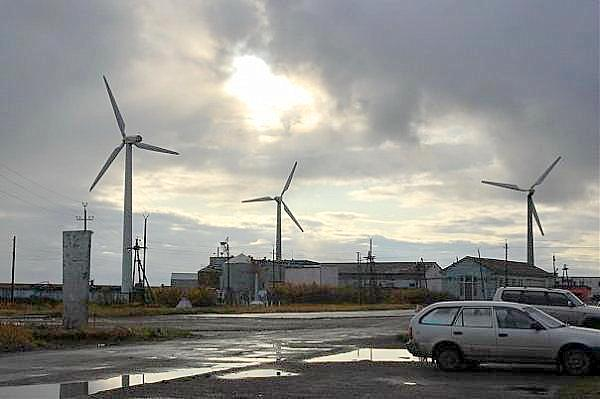 osada portowo-rybacka Oktiabr'skij na Kamczatce nad Morzem Ochockim